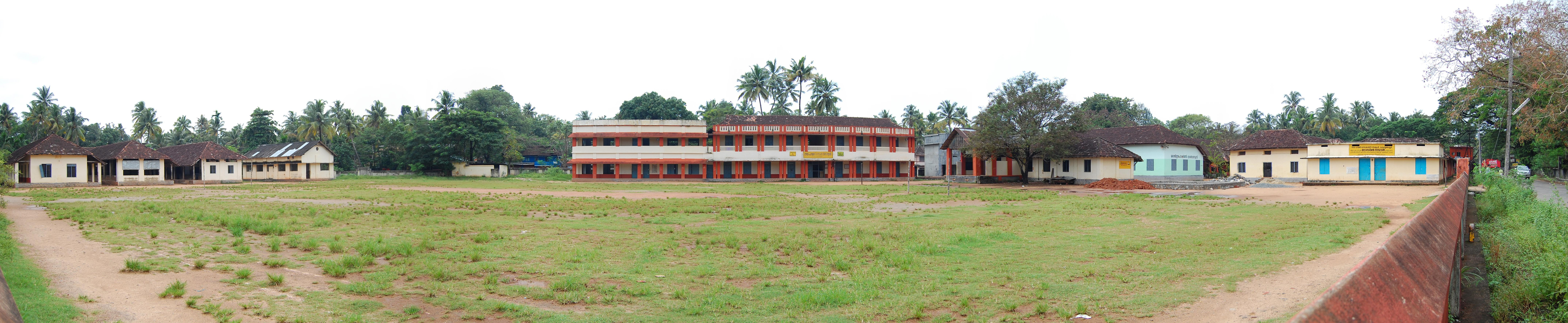 Government Boys High School Kodungallur